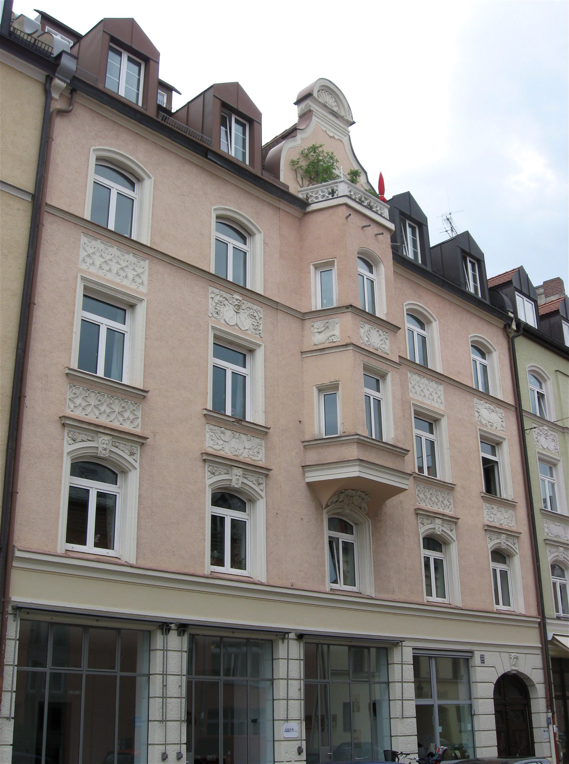 Kirchenstraße 23; Mietshaus, deutsche Renaissance, mit Erker und reichem Stuckdekor, 1898 von Ludwig Grothe; Gruppe mit Nr. 21 und 25.